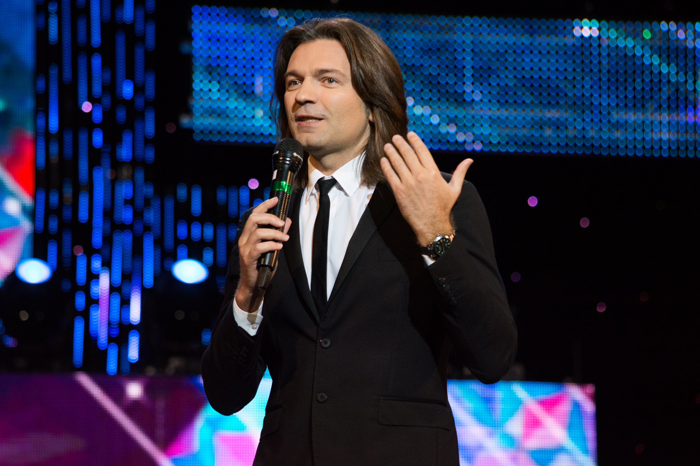 Дмитрий Маликов на Славянском Базаре 2015